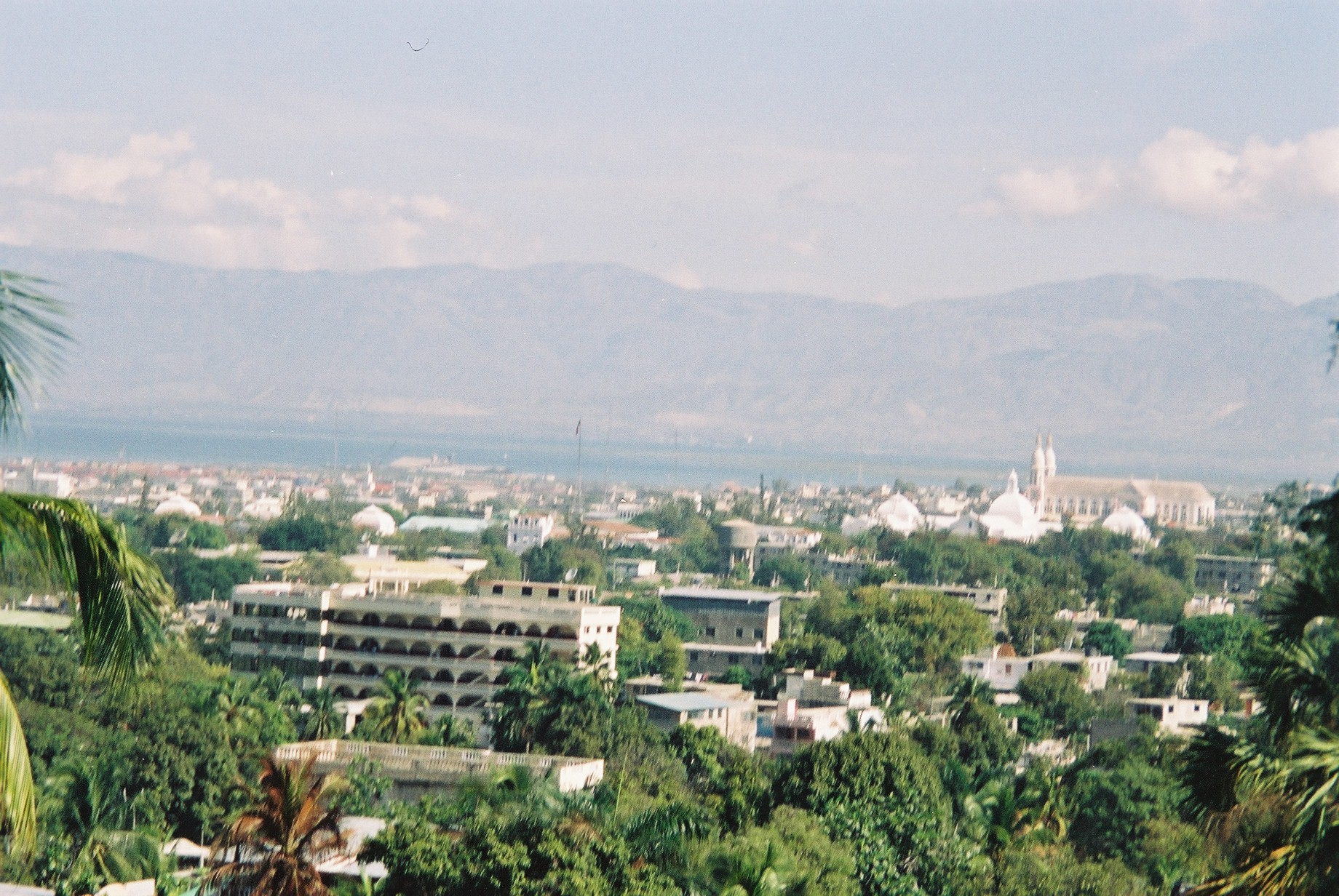 Vue sur la baie de Port-au-Prince depuis l'hotel Oloffson